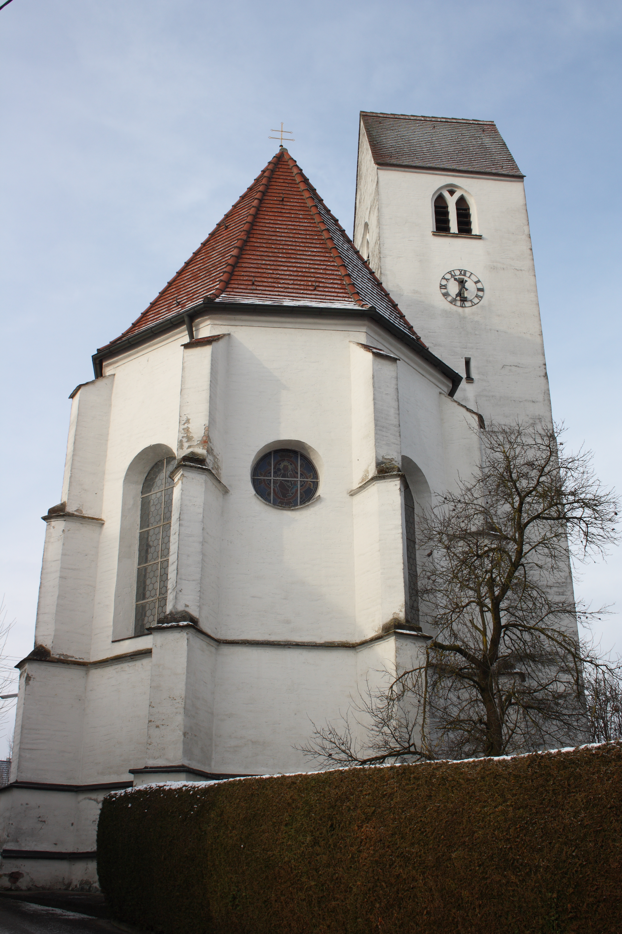 Katholische Filialkirche St. Margareta in Aislingen im Landkreis Dillingen an der Donau, Ansicht von Nordosten, sechsgeschossiger Turm mit Satteldach im nördlichen Chorwinkel, Chor mit Strebepfeilern